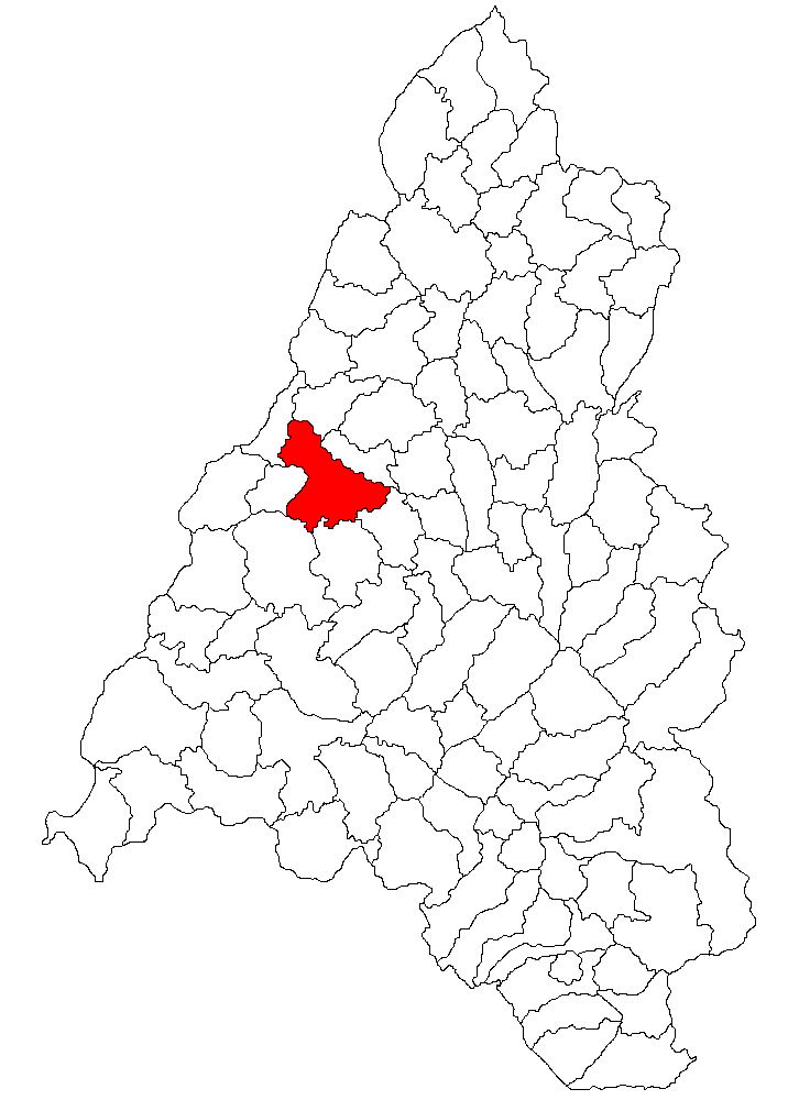 Categorie:Hărţi ale judeţului Bihor Licensing Categorie:Imagini din Oradea